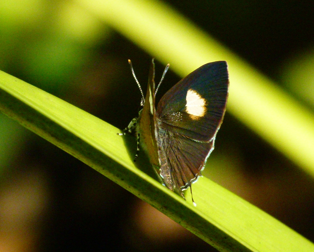 Horaga viola, Wynaad, India.